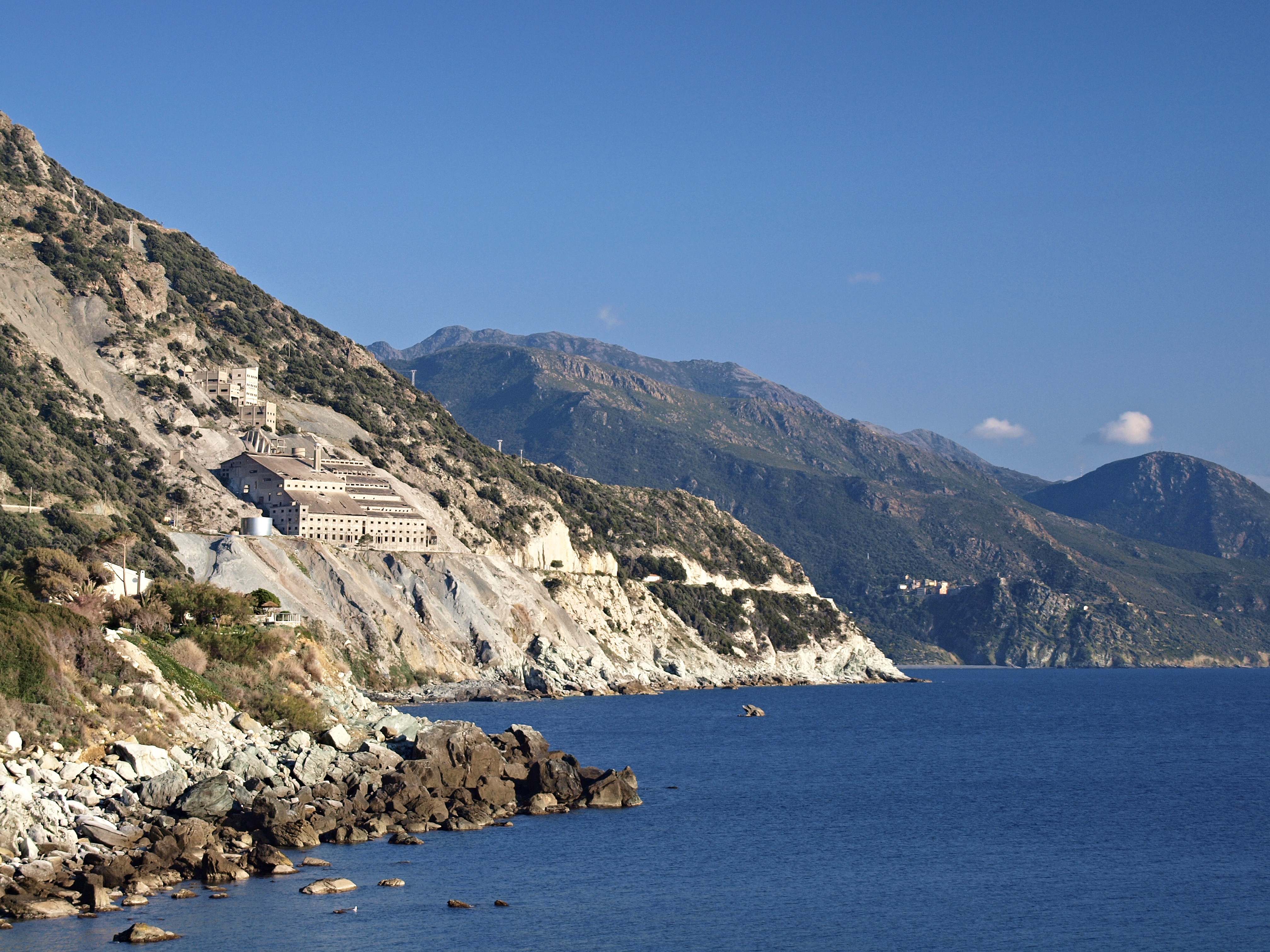 Canari (Corsica - Ancienne usine d'amiante d'Abro